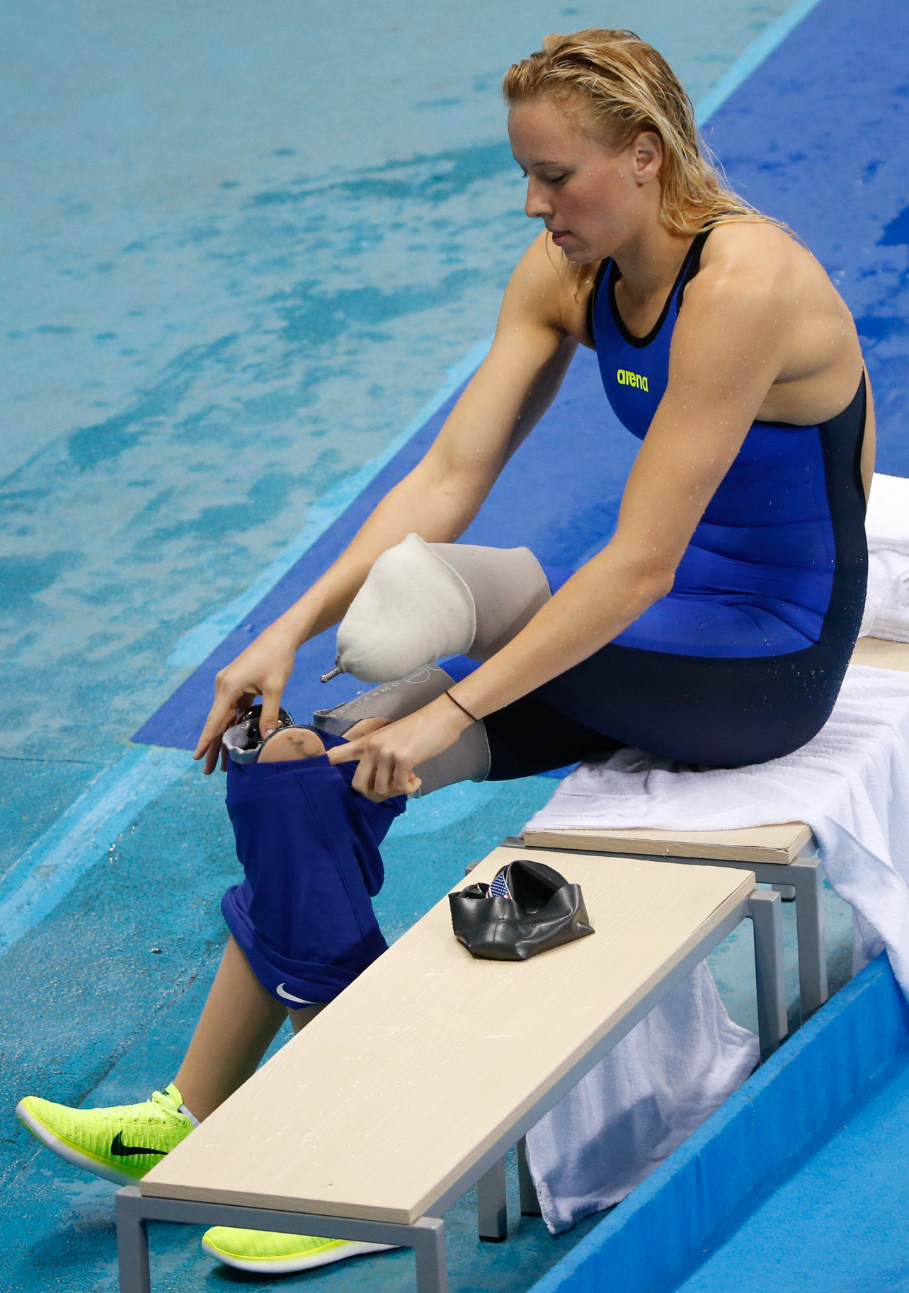 Rio de Janeiro - Jessica Long dos Estados Unidos disputa prova dos 100m nado livre S8 feminina nos Jogos Paralmpicos Rio 2016, no Estdio Aqutico.